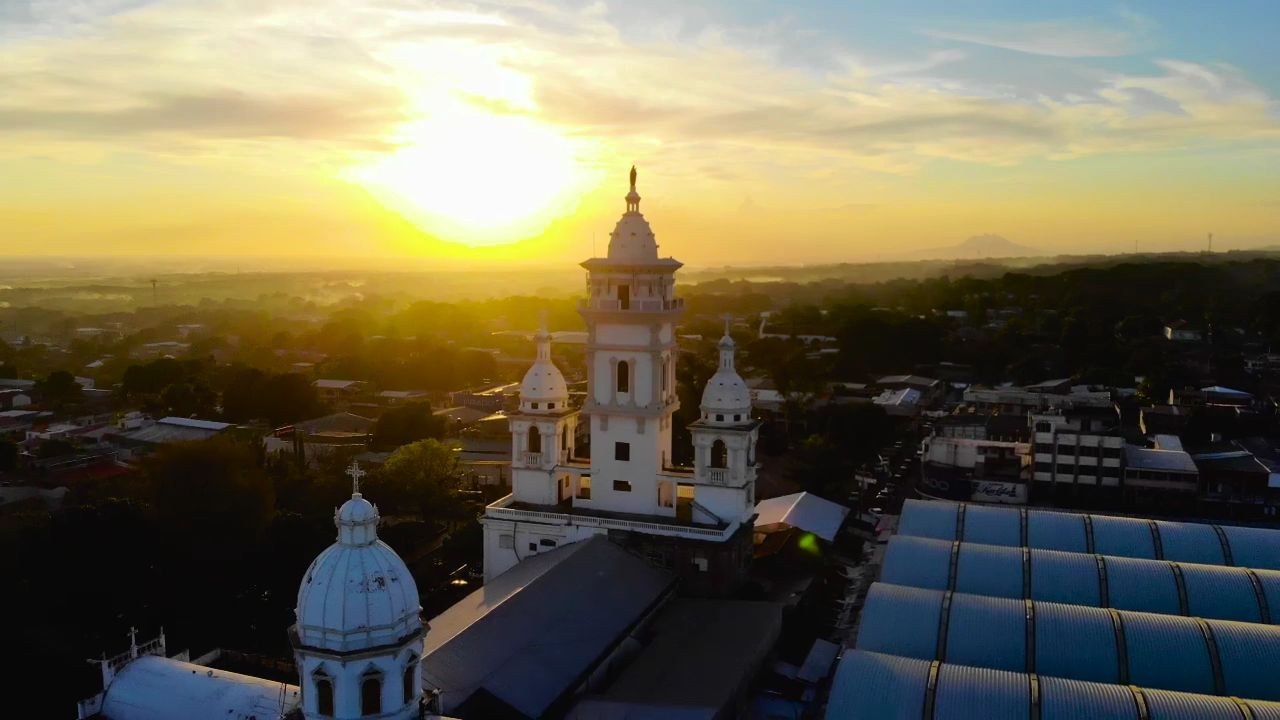 Vista hacia el poniente desde la catedral de Zacatecoluca al atardecer